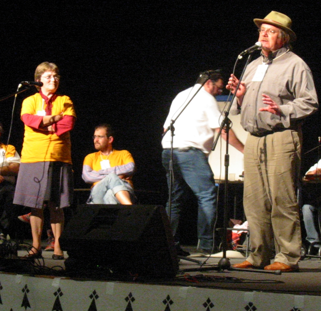 Joute contée à la Fête Mill Góll en Pays Gallo 2007